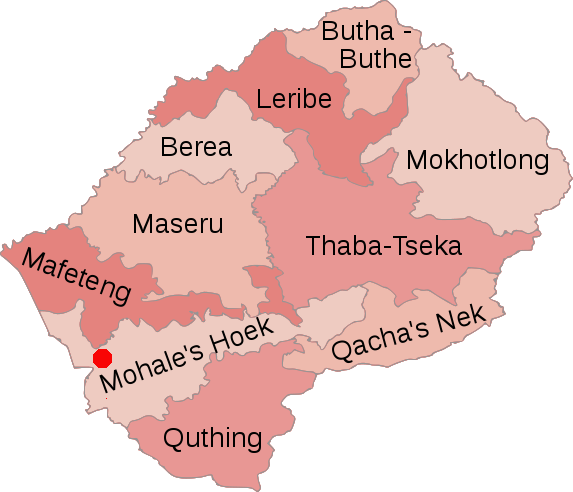 Carte des districts du Lesotho